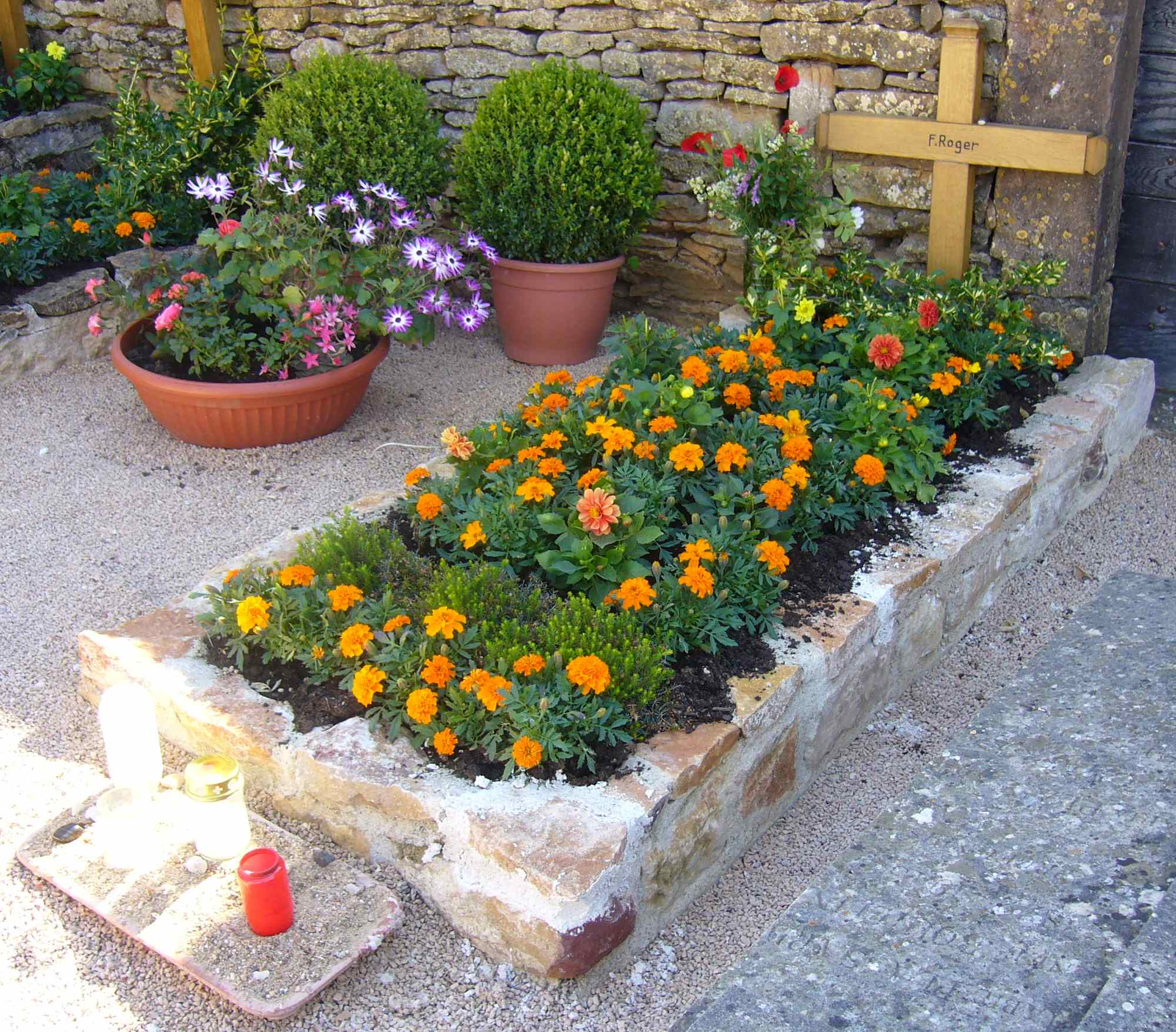 Das Grab von Frere Roger.